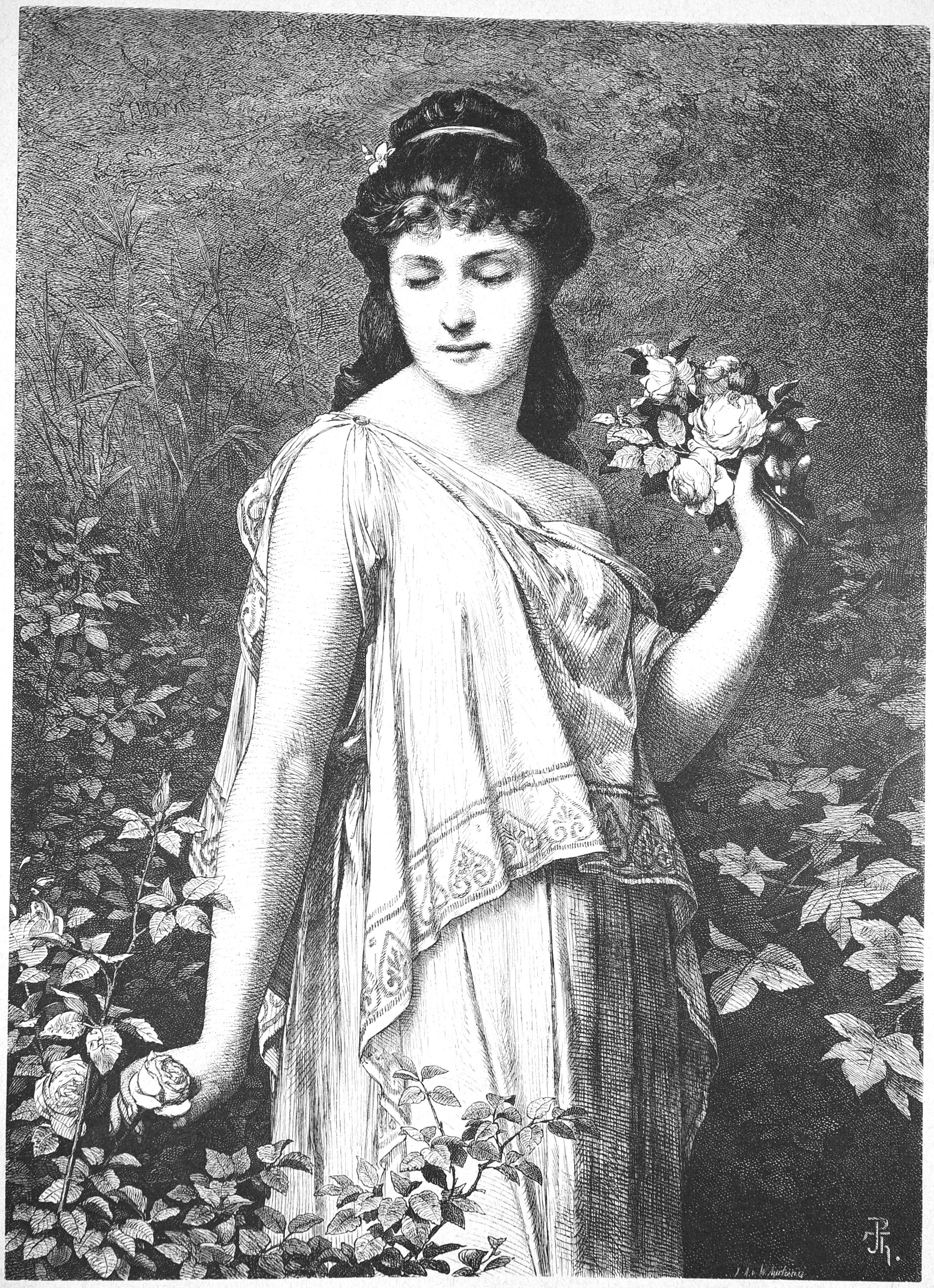 Die Zeit der Rosen und der Träume Nach seinem Oelgemalde auf holz gezeichnet von Professor Paul Thumann in Berlin